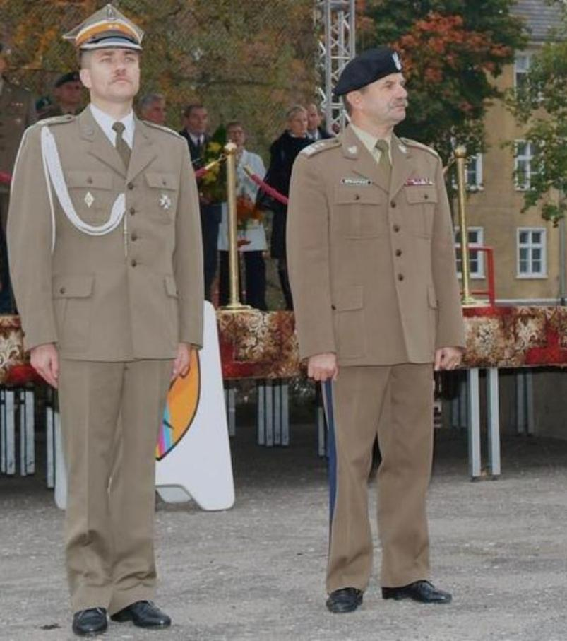 Dowódca garnizonu Stargard Szczeciński ppłk Dariusz Górniak